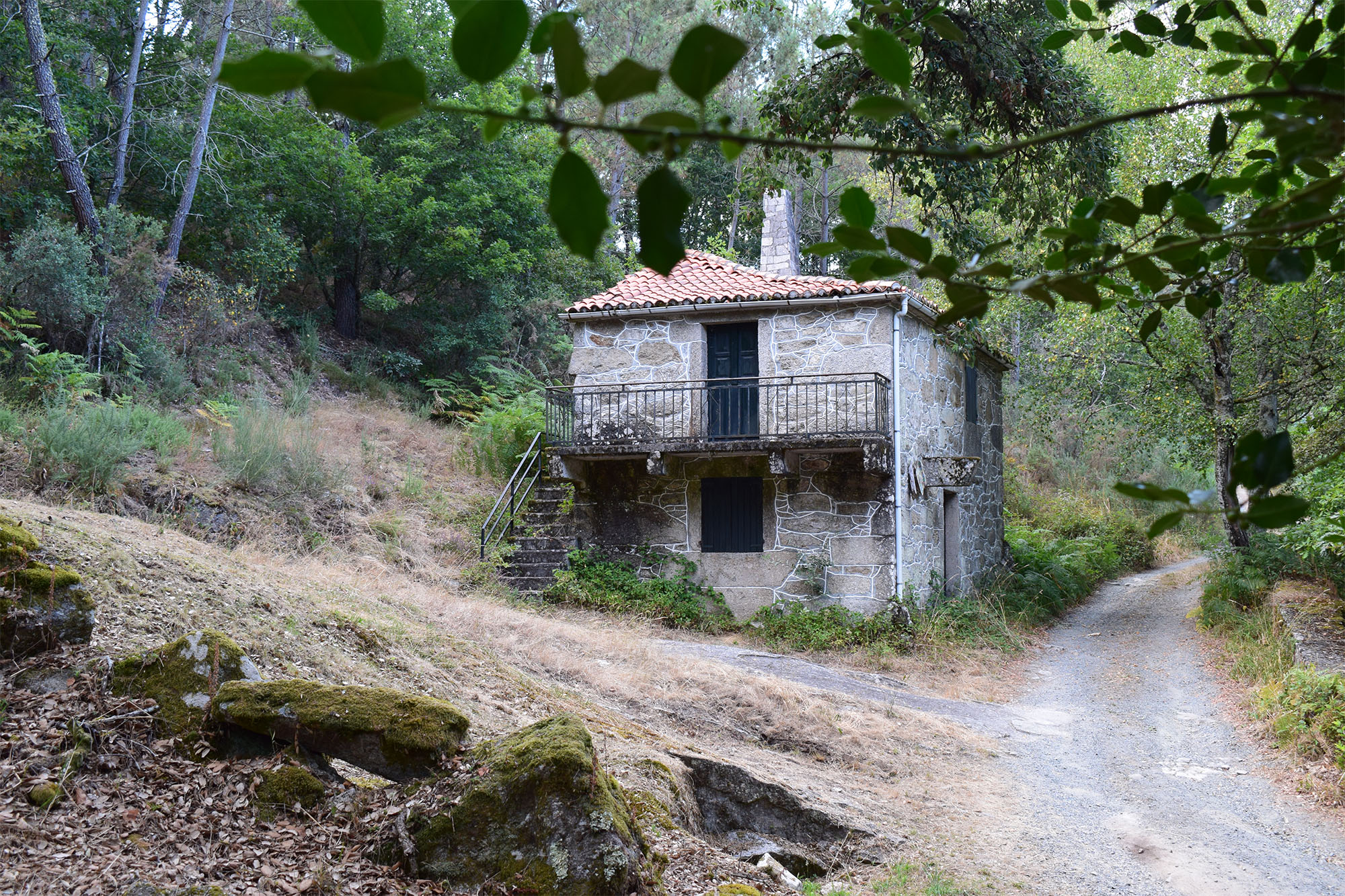 Edificación que na actualidade utilízase como refuxio de pescadores, a carón do río Ulla, no lugar de O Corgo, parroquia de San Martiño de Vilapoupre (Antas de Ulla)